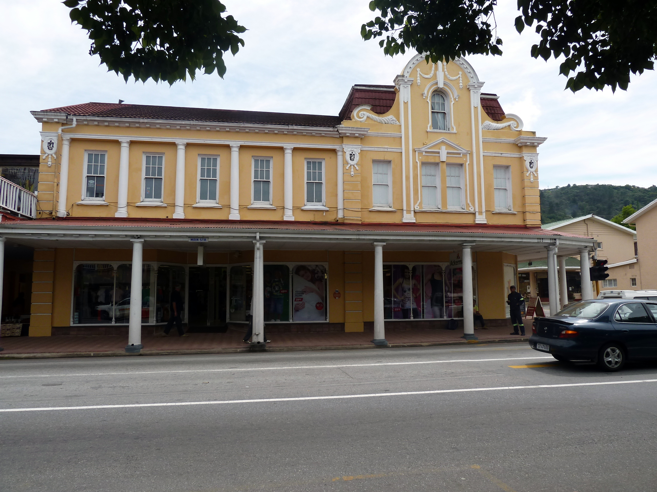 Melville's